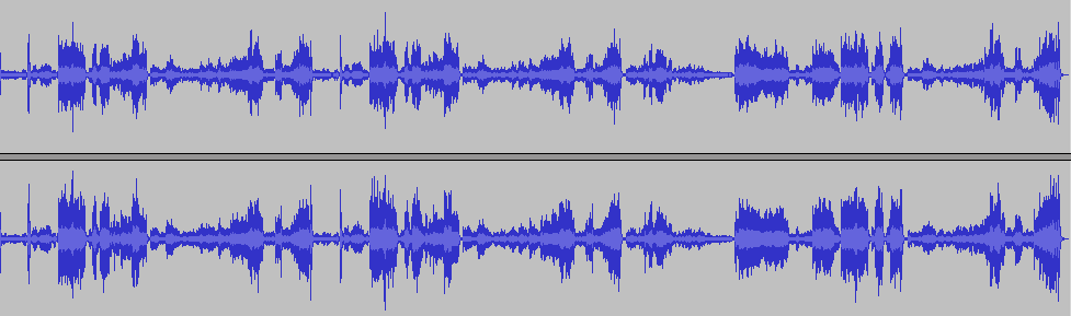 Haydn symfoni nr 61 i D major